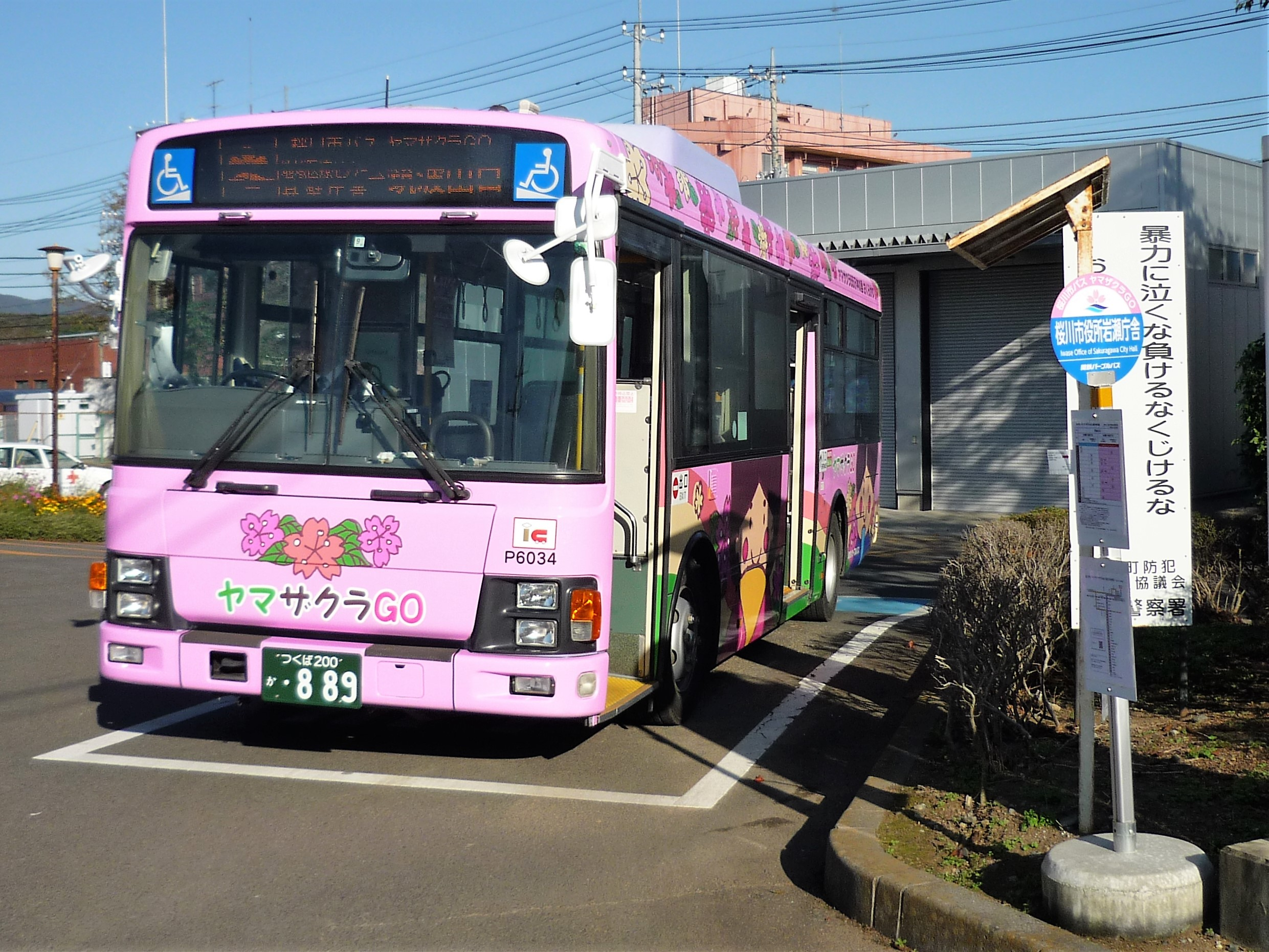 桜川市役所岩瀬庁舎バス停に停車中の桜川市バス Panasonic Lumix DMC-FS3